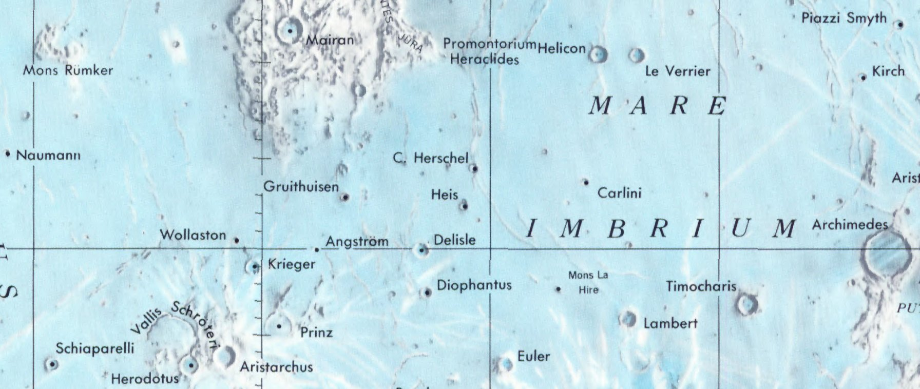 Cráter lunar C.Herschel. Localización. (Lunar Chart LPC1. Second Edition)